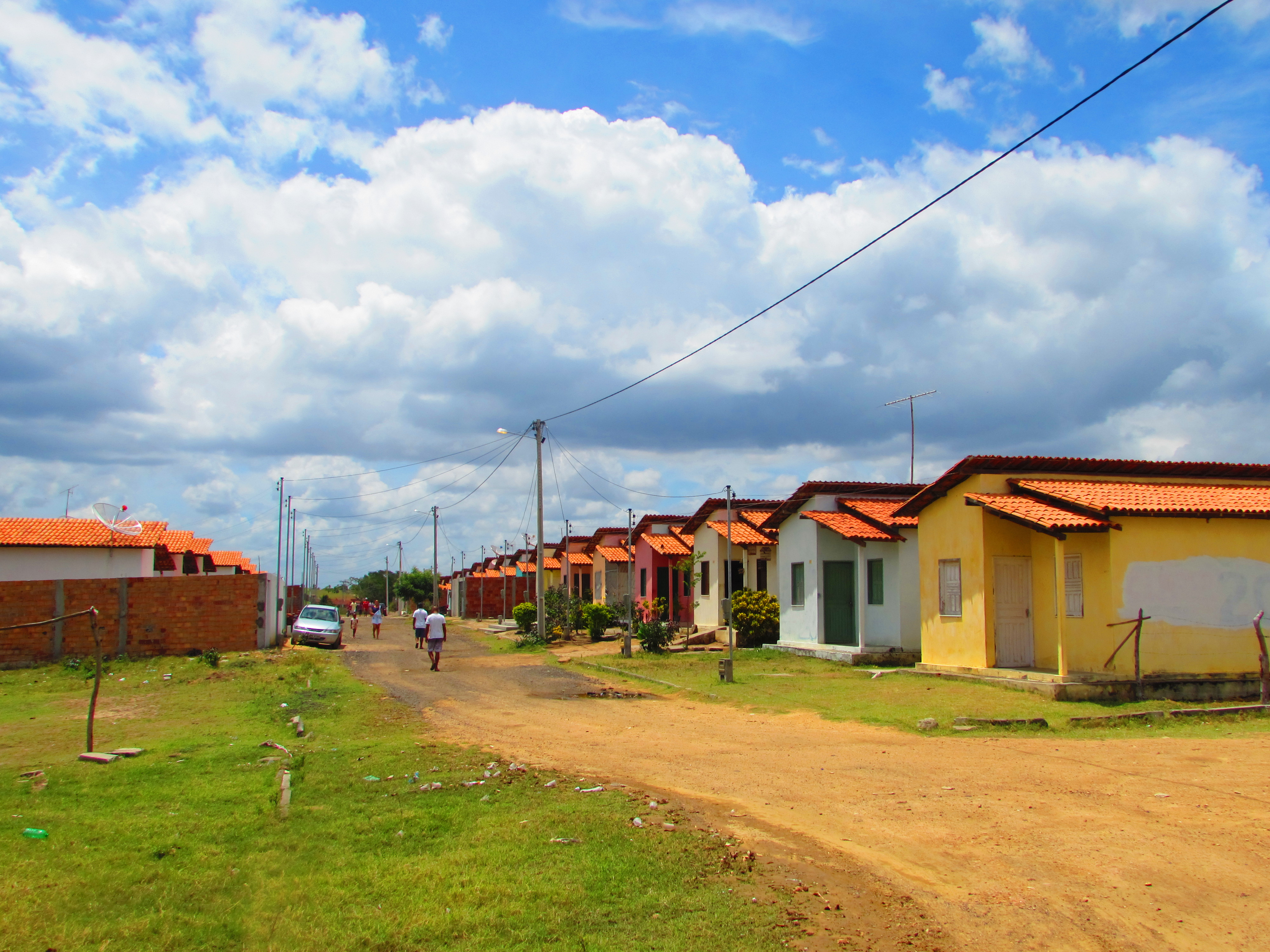 Minha casa minha vida antonio cardoso